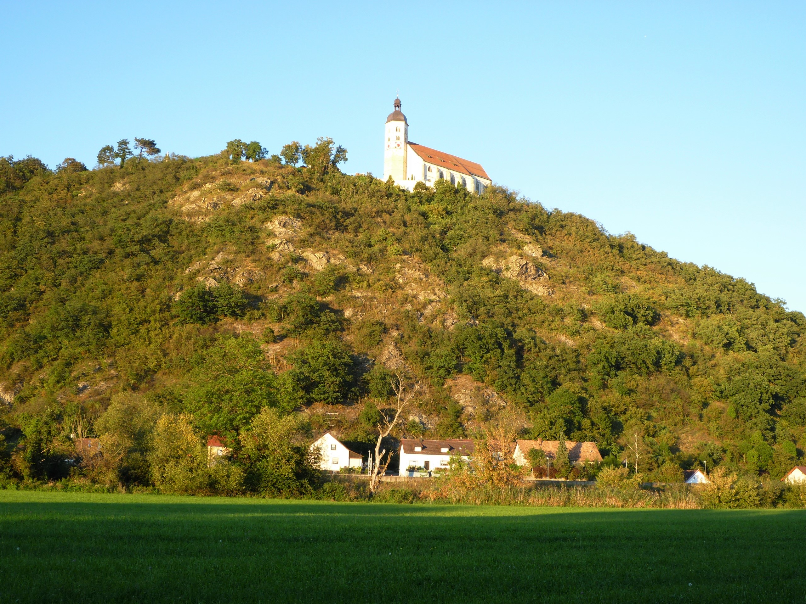 Blick auf den Südhang des Bogenberges, der zugleich Geotop und Naturschutzgebiet ist. Am Fuße des Berges ist die Wohnhäuser der Deggendorfer Straße zu sehen.